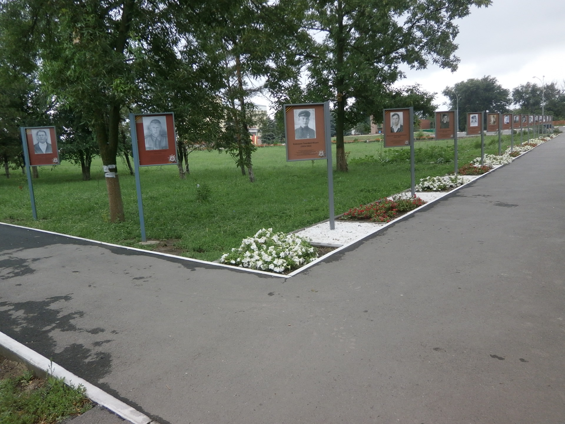 Аллея боевой славы в посёлке Весёлый Ростовской области